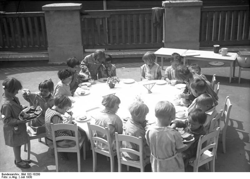 Kinder erziehen sich selbst! Aufnahmen aus dem Montessori-Kinderheim in Berlin-Dahlem! Eine neue Methode, die sich in der Kinder-Erziehung glänzend bewährt und ständig an Bedeutung zunimmt, ist das System der italienischen Aerztin und Pädagoin Dr. Maria Montessori. Die ersten Versuche, die Montessori-Methode in Deutschland einzubürgern, wurden nach dem Kriege gemacht. Die Grundlage dieser Erziehungsmethode ist, eine lebhafte und selbstständige Tätigkeit des Kindes zu entfalten. Schon die äussere Einrichtung der Montessori-Kinder-Häuser ist zweckentsprechend auf die kleinen Insassen eingestellt. Alle Möbel, alle Gegenstände, die sich in den Räumen befinden, sind auf Grund langjähriger Erfahrung zweckdienlich construiert. Es besteht kein Unterschied zwischen Spiel und Arbeit, sodass das Kind alles spielend aufnimmt. Die Kinder spielen und arbeiten ganz frei und tun das, was ihnen gefällt. Sie haben auch gemeinsame Arbeiten, wie Tischdecken, Anrichten, Abräumen, Abwaschen, Plätten ,Waschen usw. Pflege von Pflanzen und Tieren weckt das Verständnis für die Natur. Selbstständige Überwindung von Schwierigkeiten bereiten den Kindern grosse Freude und entwickelt ihr Pflichtgefühl und ihre Verantwortung. Alles geschieht ohne viel Worte und Ermahnungen. Die Deutsche Montessorigesellschaft hat in den 7 Jahren ihrer Arbeit in Deutschland schon heute schöne Ergebnisse gezeitigt. Es ringt sich immer mehr in dem deutschen Unterrichts- und Erziehungs-Wesen die Überzeugung durch, die Kräfte , die Anlagen, die im Kinde liegen , zu erhalten und zu wecken. - Das selbstzubereitete Frühstücksbrot wird von den Kindern herumgereicht und mit der Gabel vom Teller genommen.